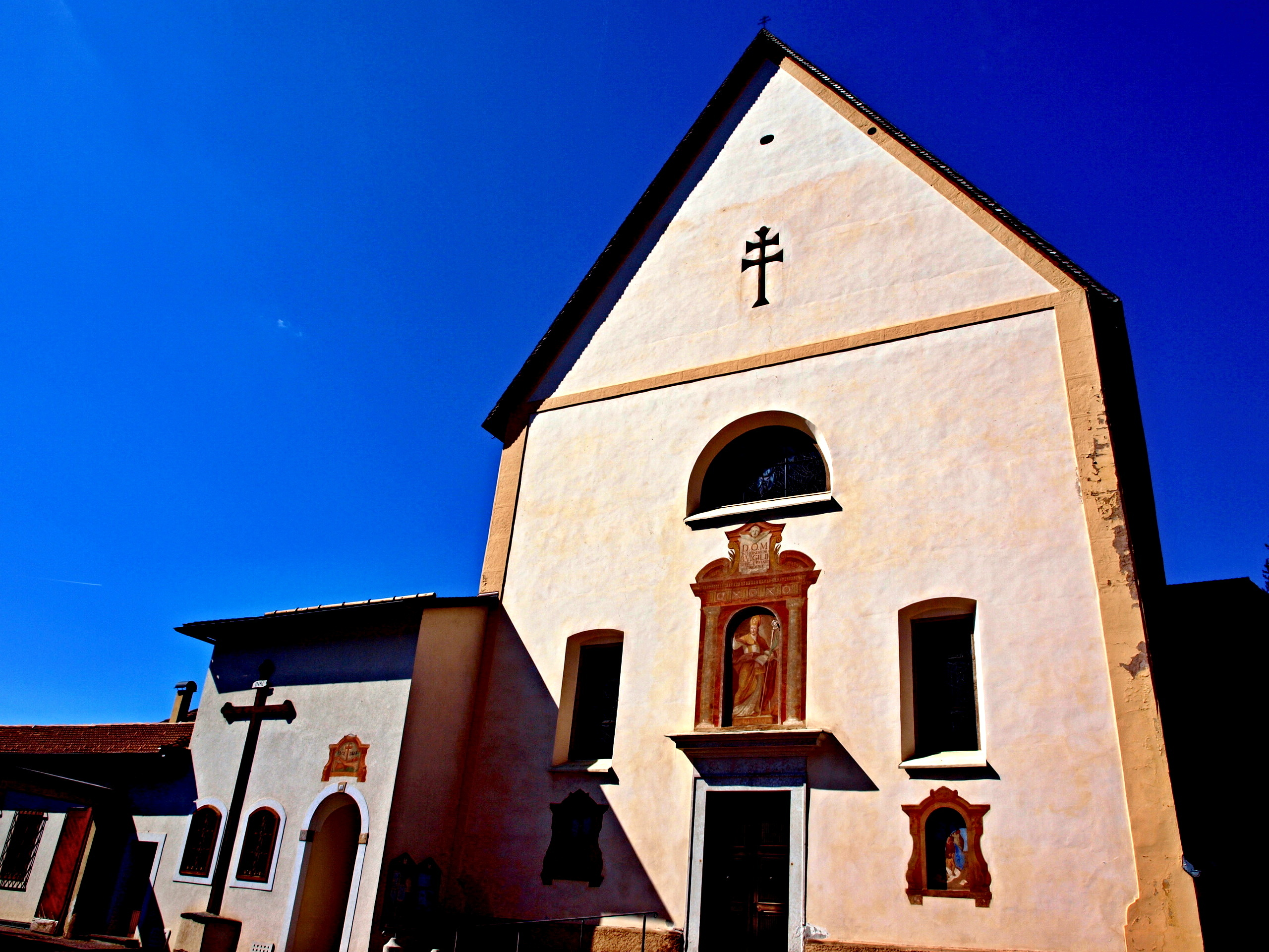 Cavalese